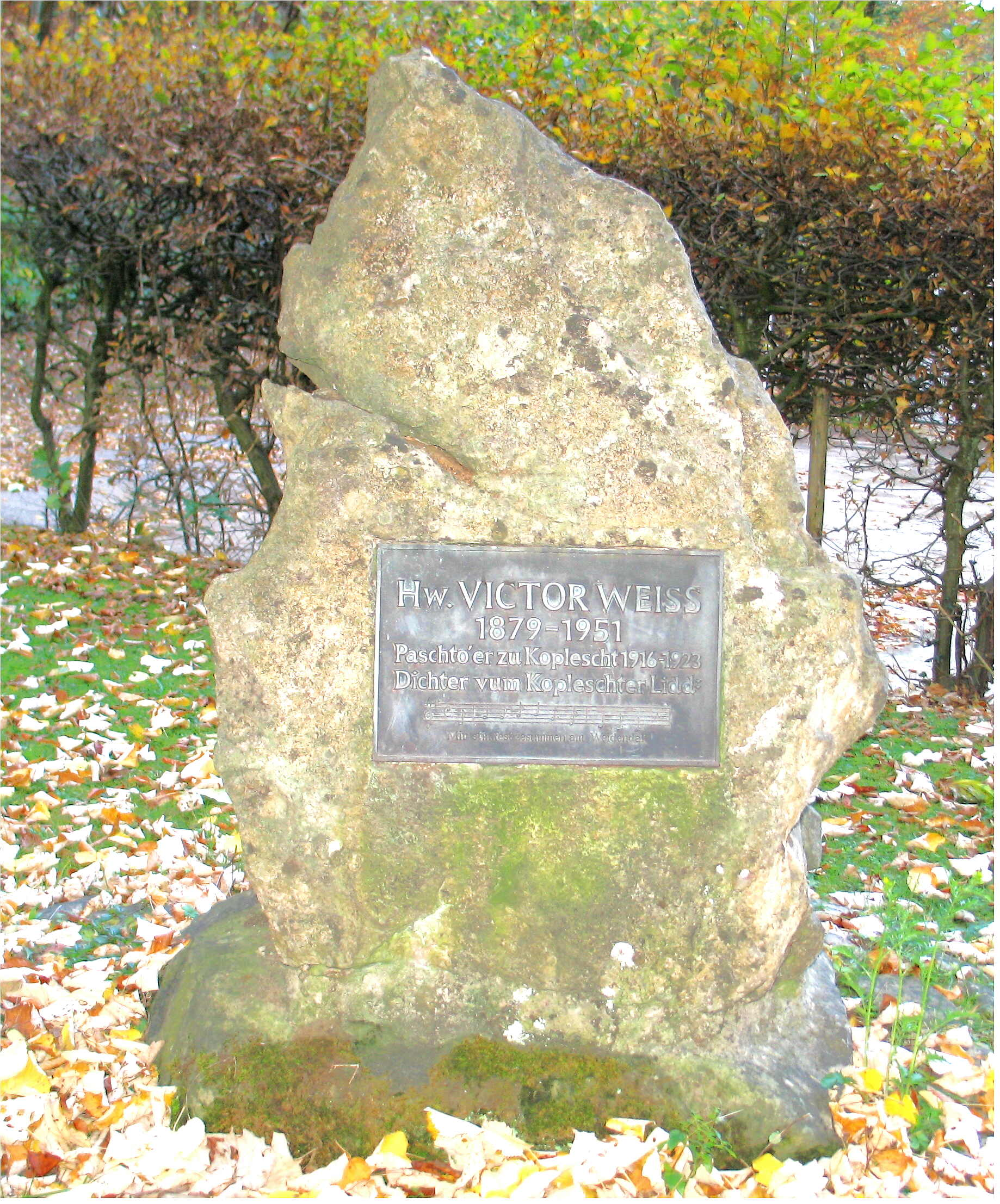 Monument vum Victor Weiss zu Koplescht (Abrëll 2006)